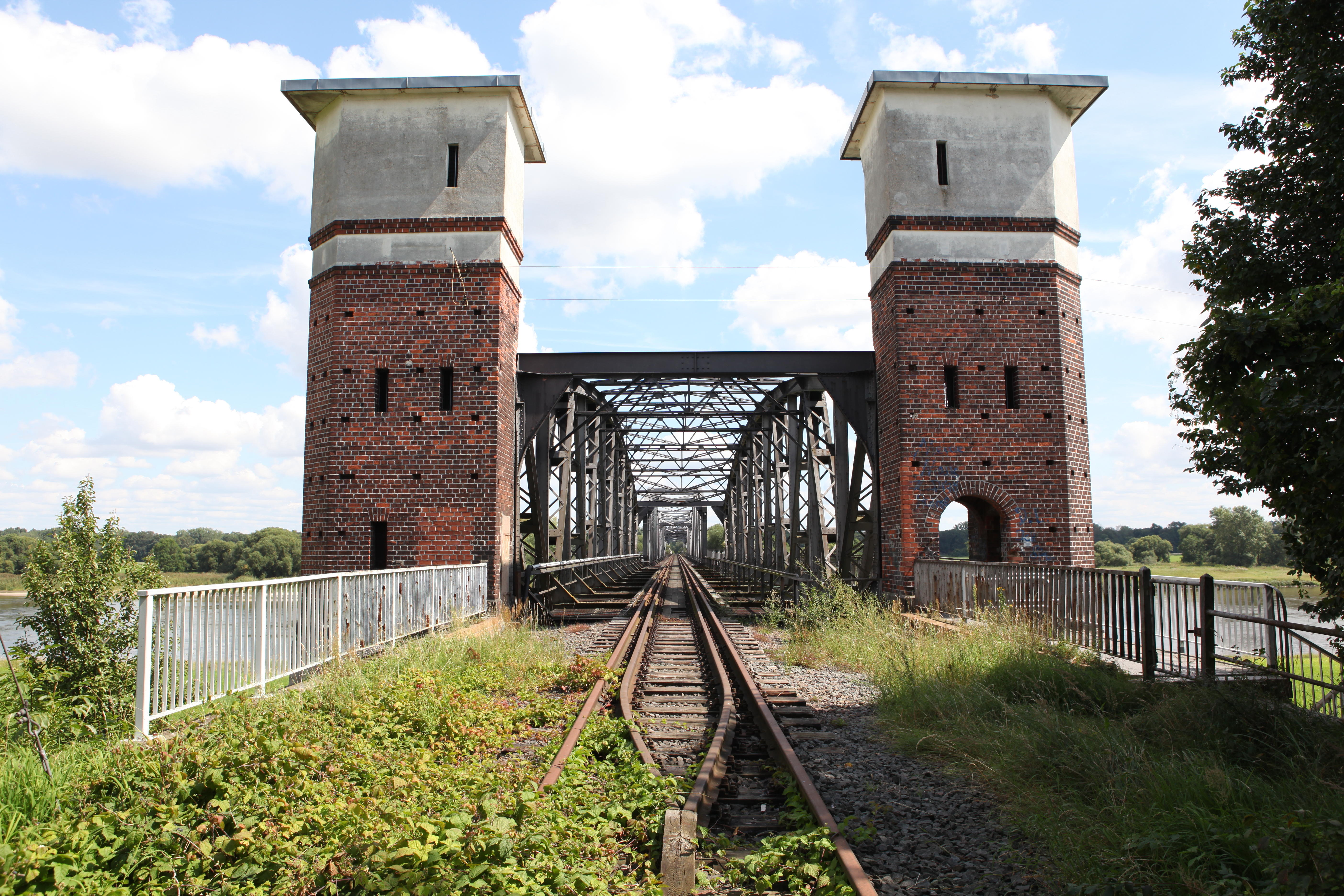 Elbebrücke Barby, Brückentürme West